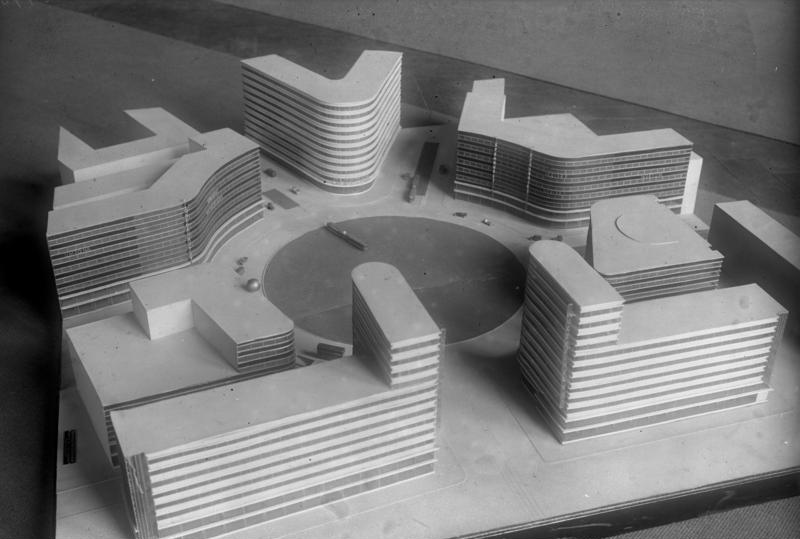 Modernes Bauen! Eine interessante Sonder-Ausstellung im Architektenhaus in Berlin. Die moderne Gestaltung des Alexanderplatzes nach dem Wettbewerb der Stadt Berlin von den Architekten Luckhardt und Anker.